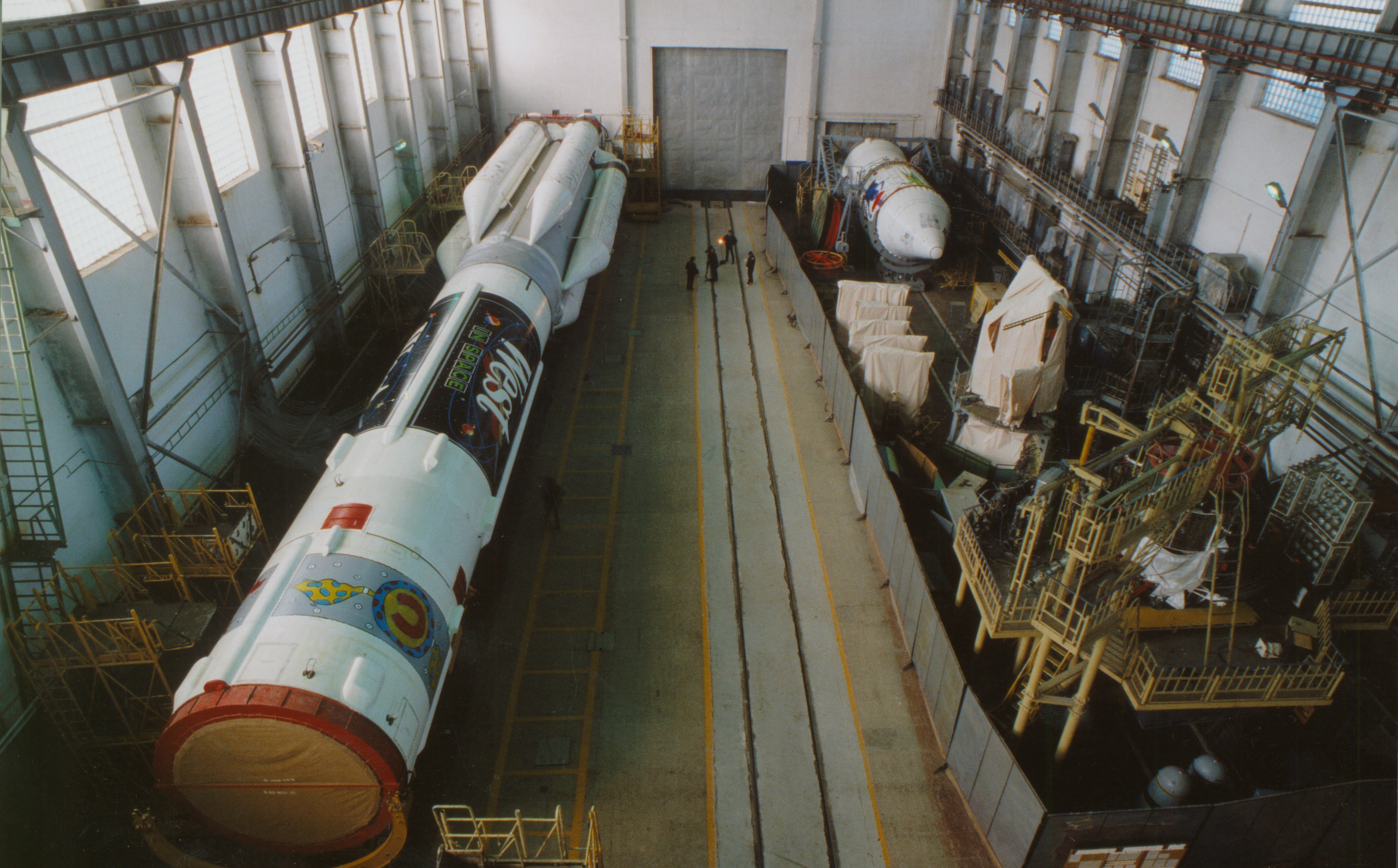 WEST IN SPACE Rakete